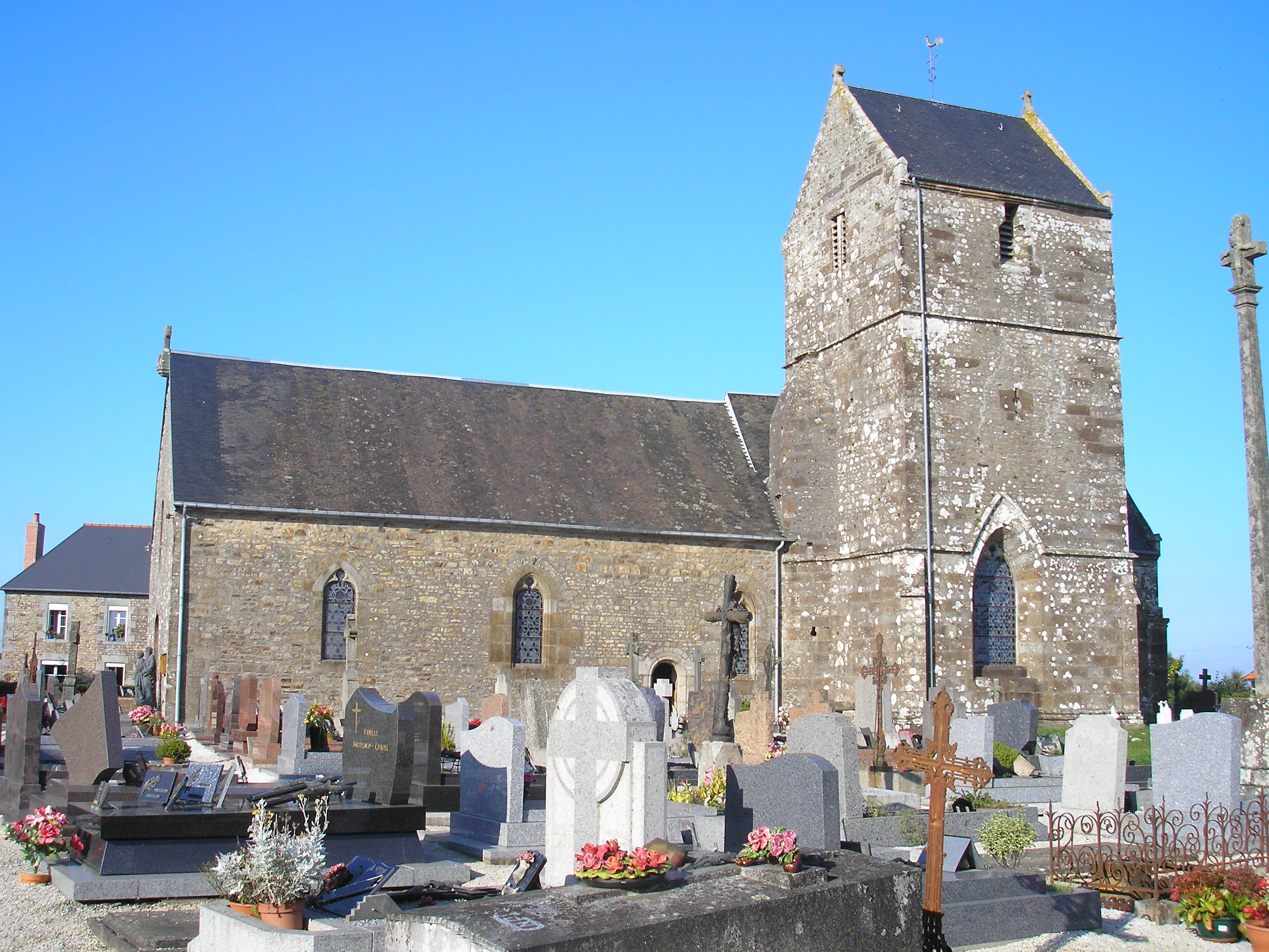 La Chaise-Baudouin (Normandie, France). L'église Saint-Ouen.